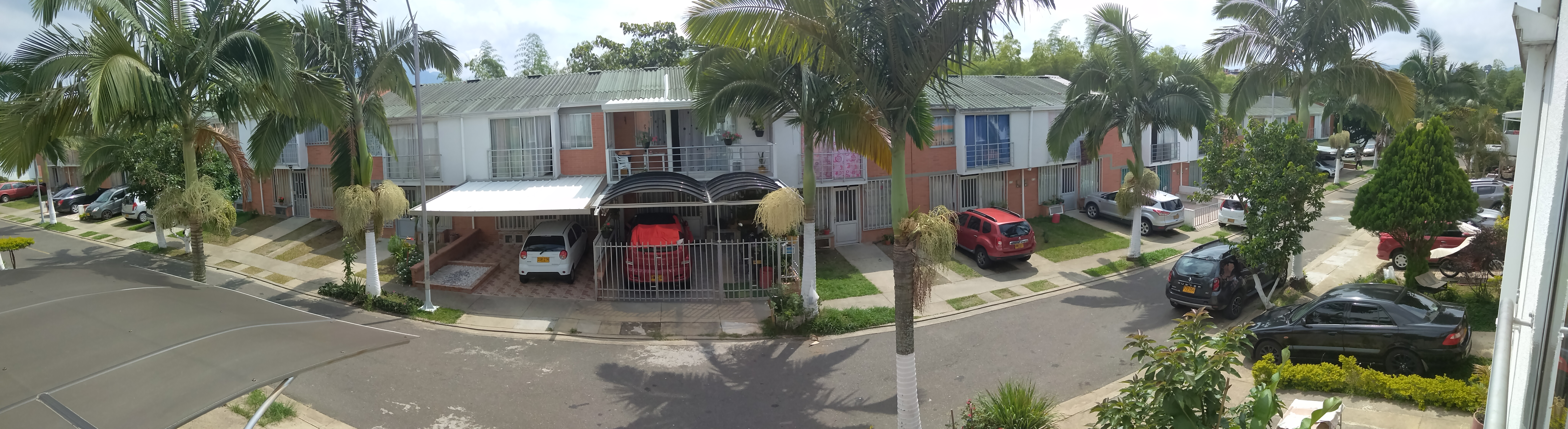 Panorámica de la ciudad de Pereira